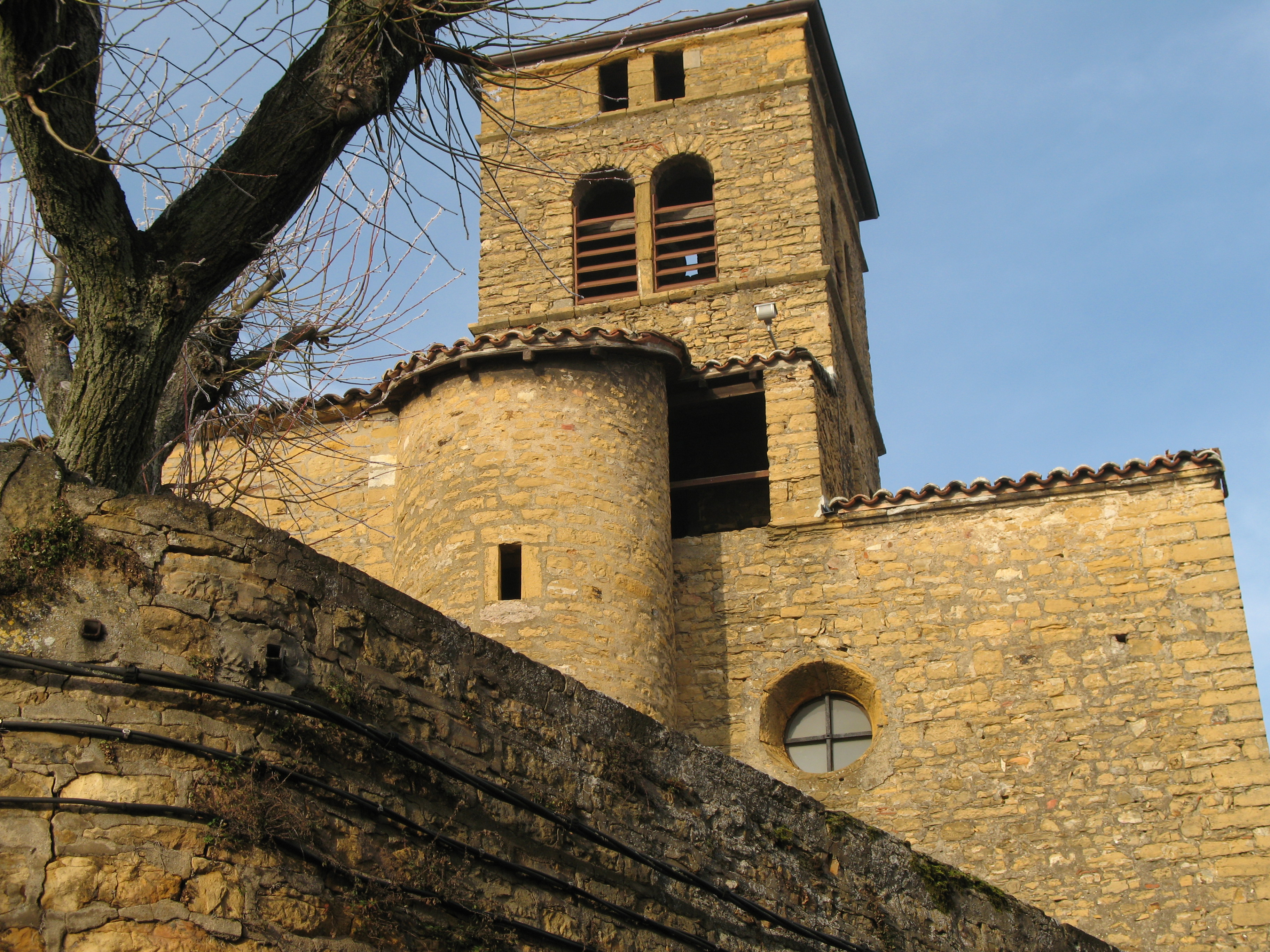 Eglise Saint-Nizier - Collonges-au-Mont-d'Or (Rhône)